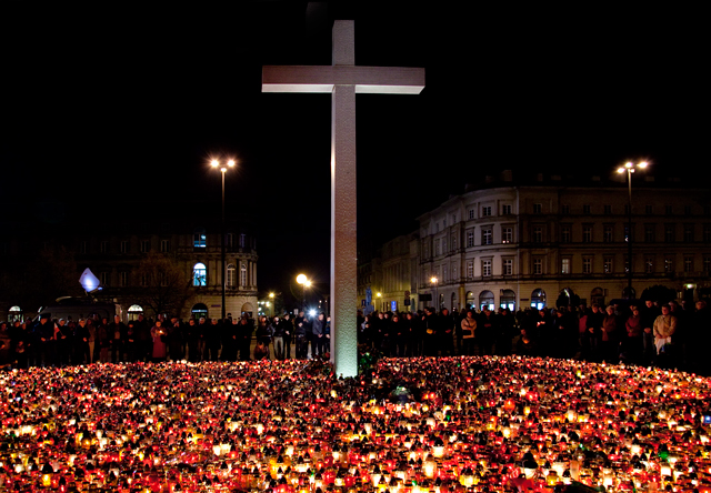 Plac J. Piłsudskiego.Warszawa - Kwiaty i znicze przy krzyżu papieskim złożone przez mieszkańców Warszawy ofiarom katastrofy prezydenckiego samolotu w dniu 10.IV.2010 r.